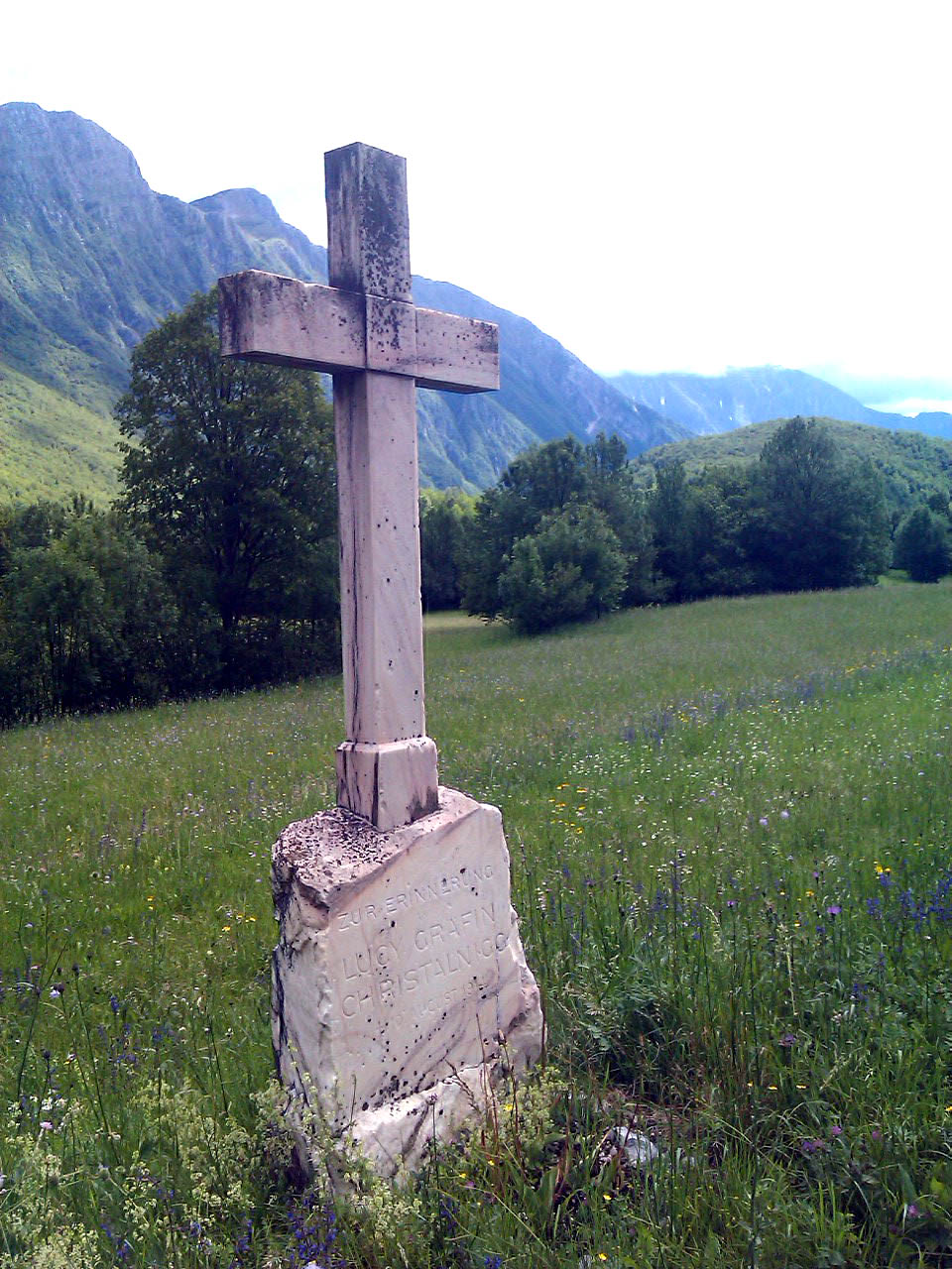 Križ v spomin grofice Cristalnigg, Srpenica